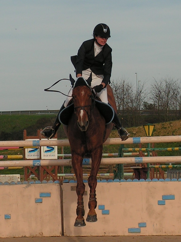 Phase descendante d'un saut d'un obstacle vertical vue de face